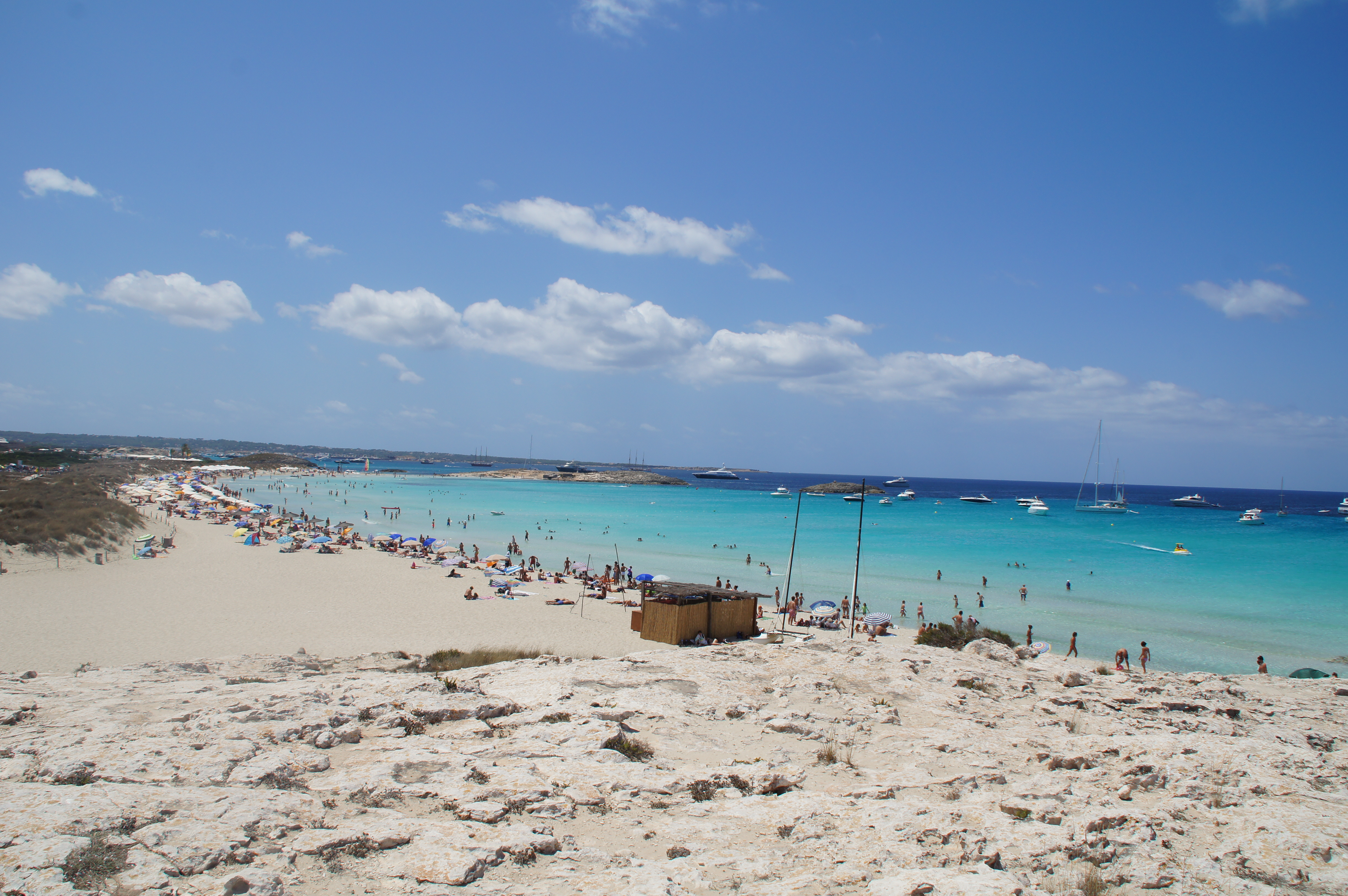 Formentera